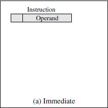 Adresimi i menjëhershëm